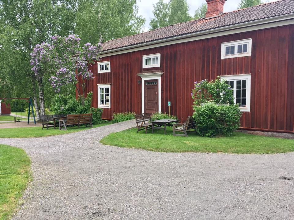 Byggnad, Lisas hus, tillhörande Träslottet i Arbrå